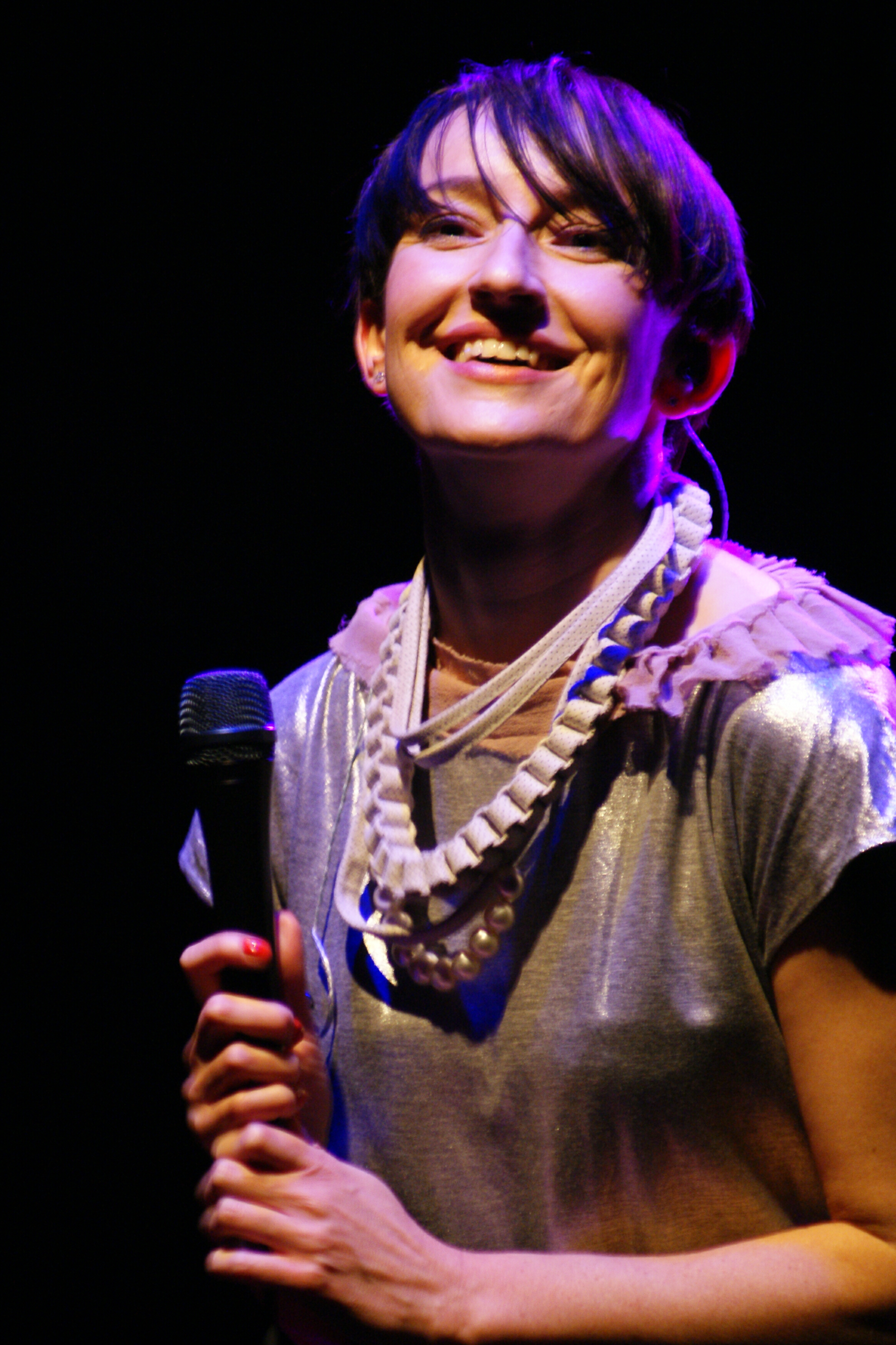 Kasia Groniec